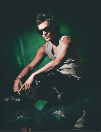 Auro Sónico en 2007